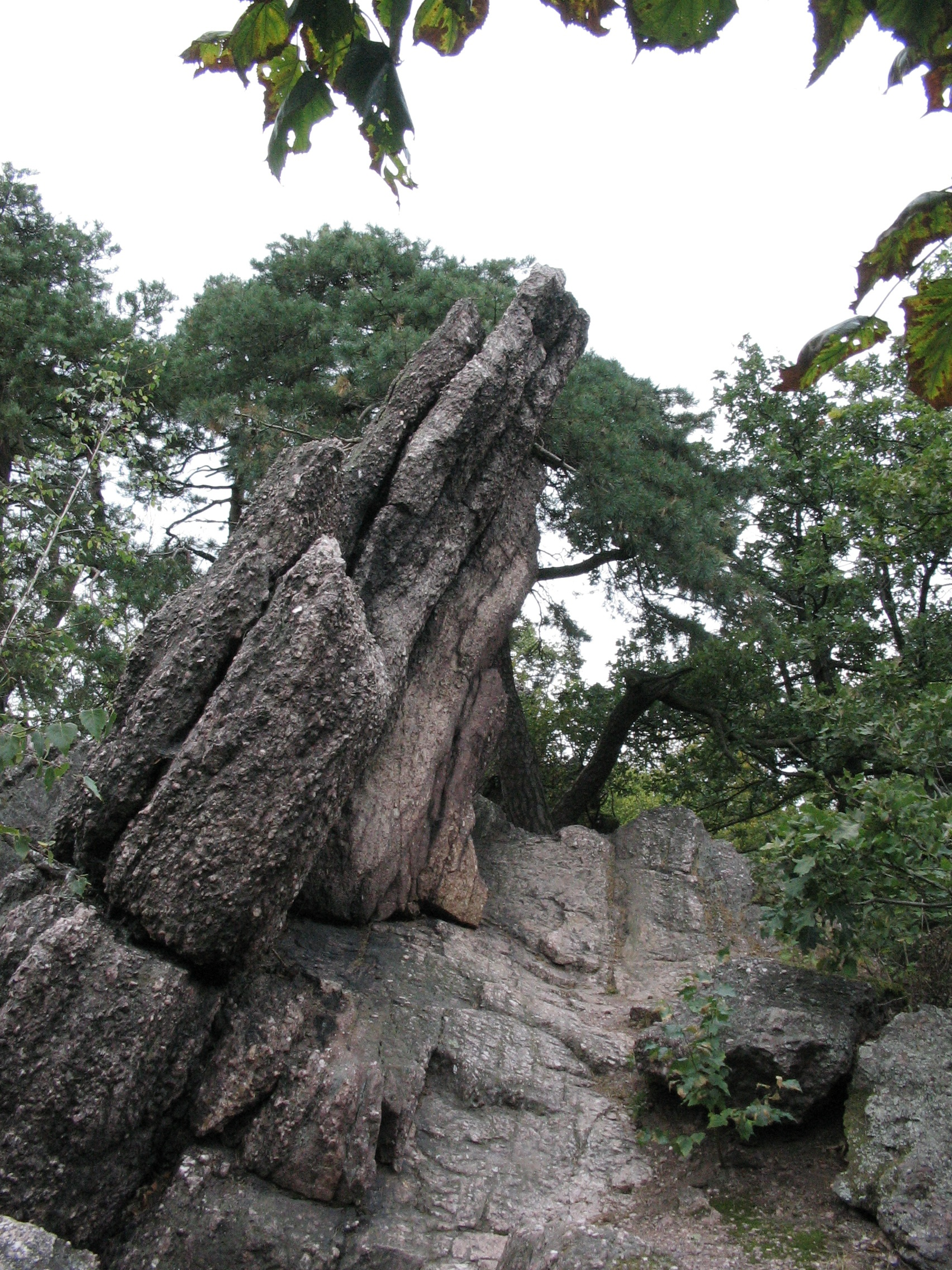 Skála na hřebenu Babího Lomu.